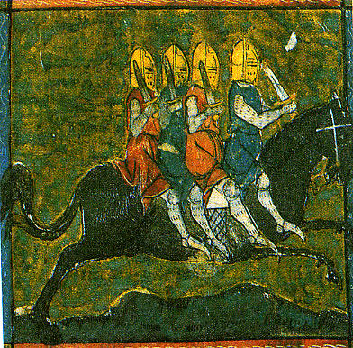 Miniature du cheval Bayard dans Paris, BnF, ms. fr. 766 folio 93r, du commencement du XIVe siècle.